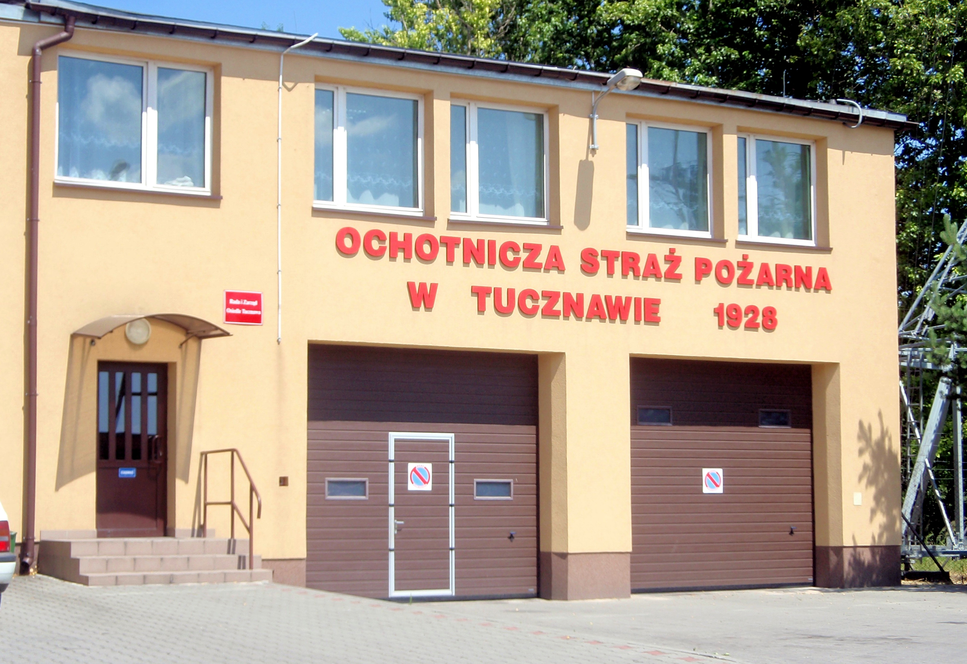 OSP w Dąbrowie Górniczej-Tucznawie